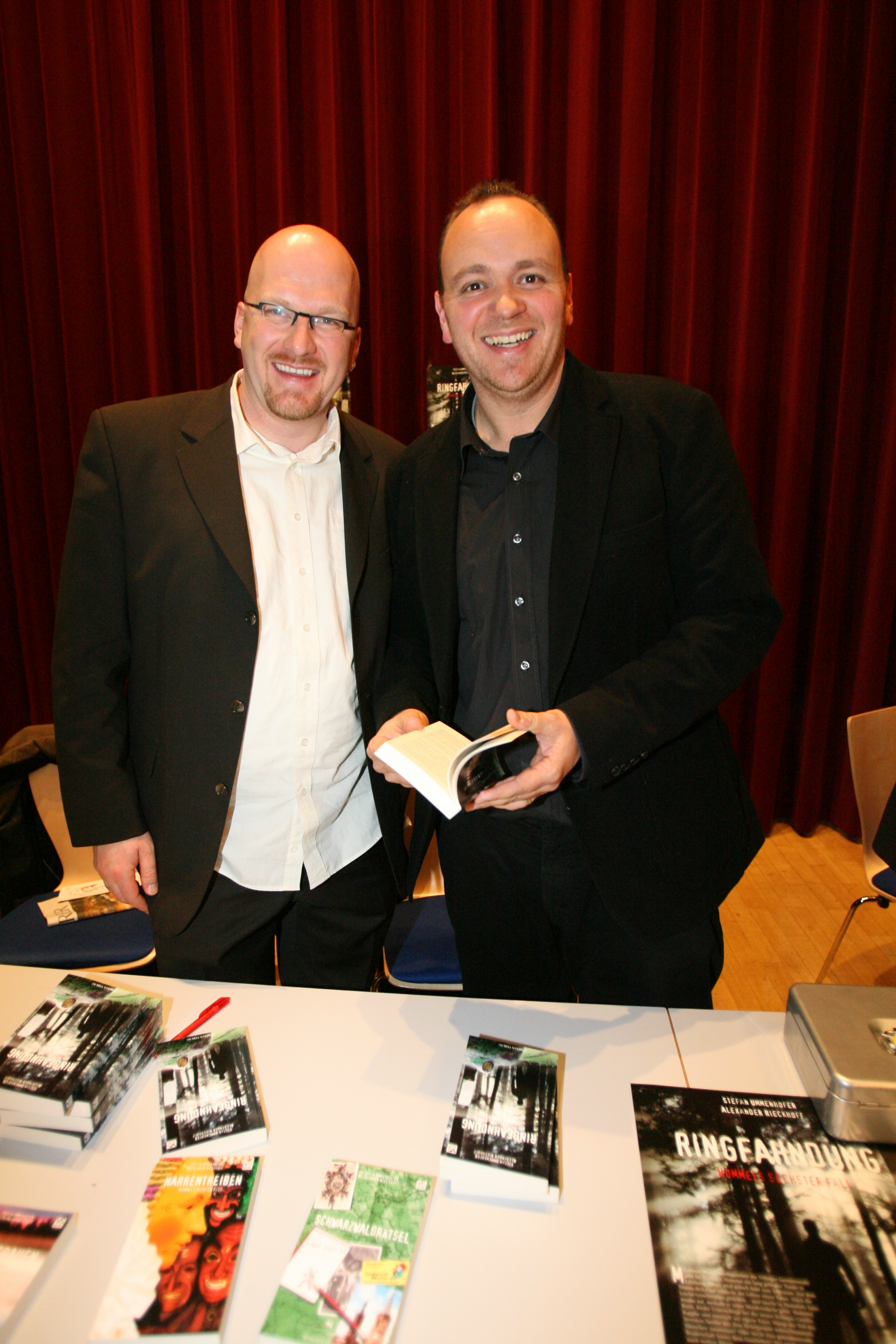 Stefan Ummenhofer (rechts) mit Alexander Rieckhoff nach einer Lesung in Villingen-Schwenningen